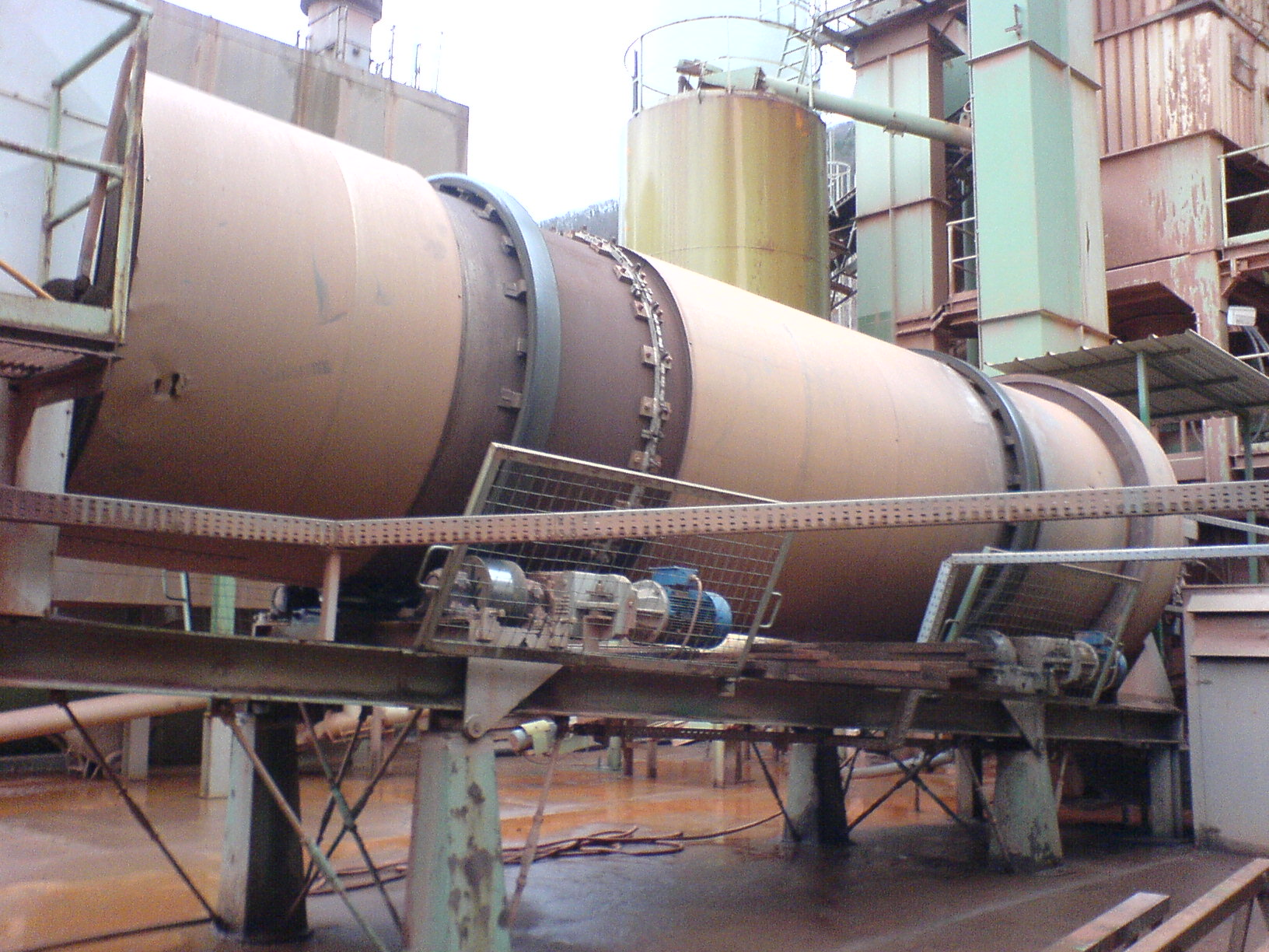 Trockentrommel einer Asphaltmischanlage